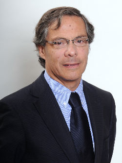 Aldo Cornejo González